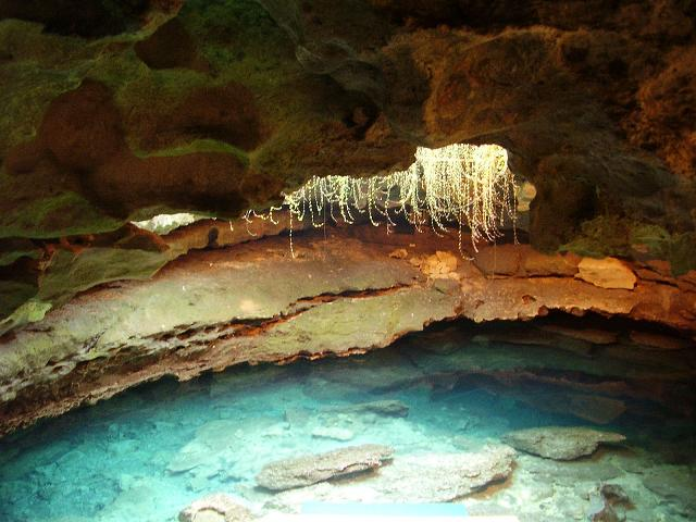 Depicted place: Devil's Den